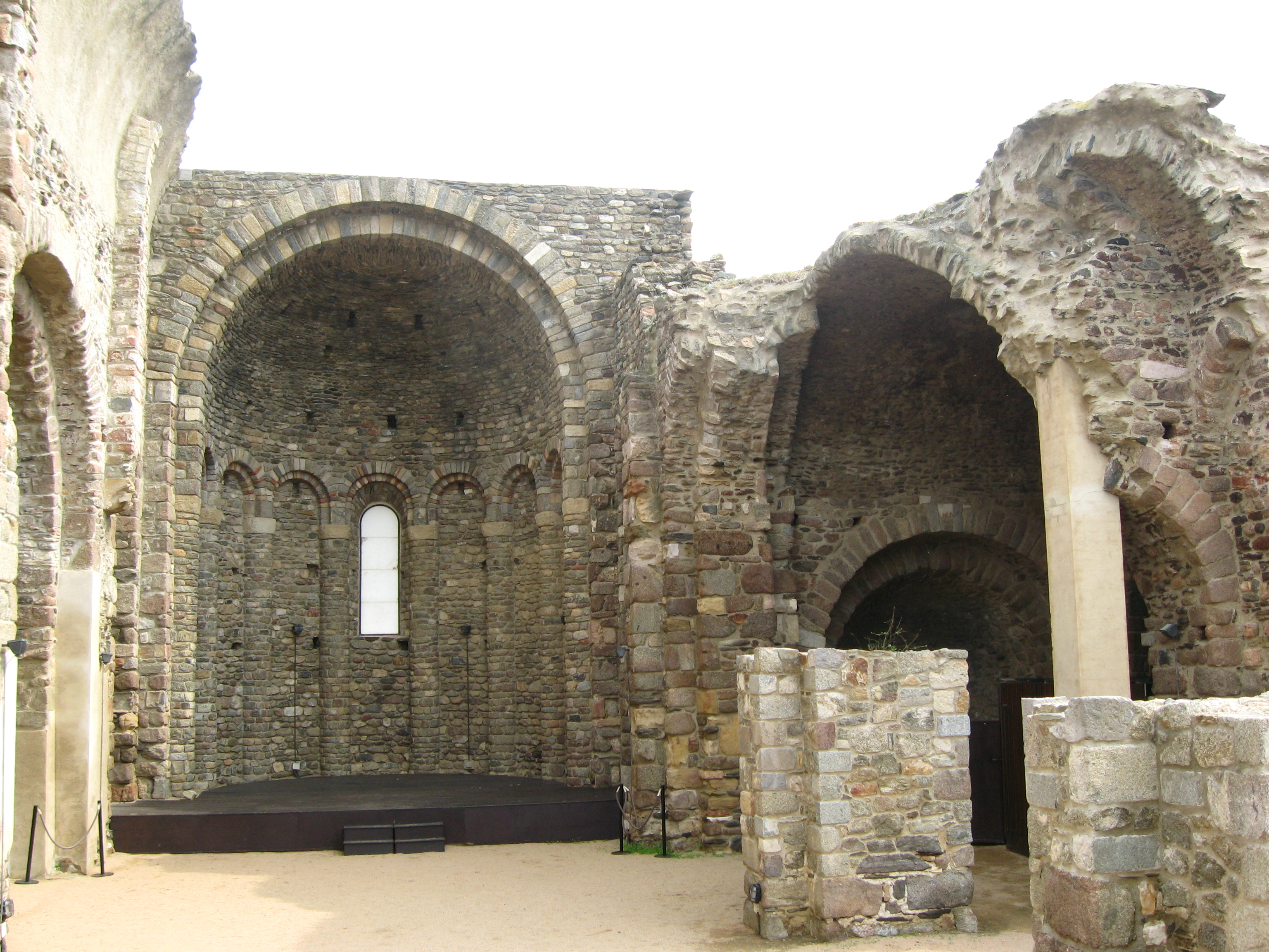 Zitadelle in Roses (Spanien/Katalonien) Datum 23.09.2010 Urheber: Michael Pfeiffer alias Benutzer:Gordito1869 Quelle: privates Fotoarchiv des Urhebers